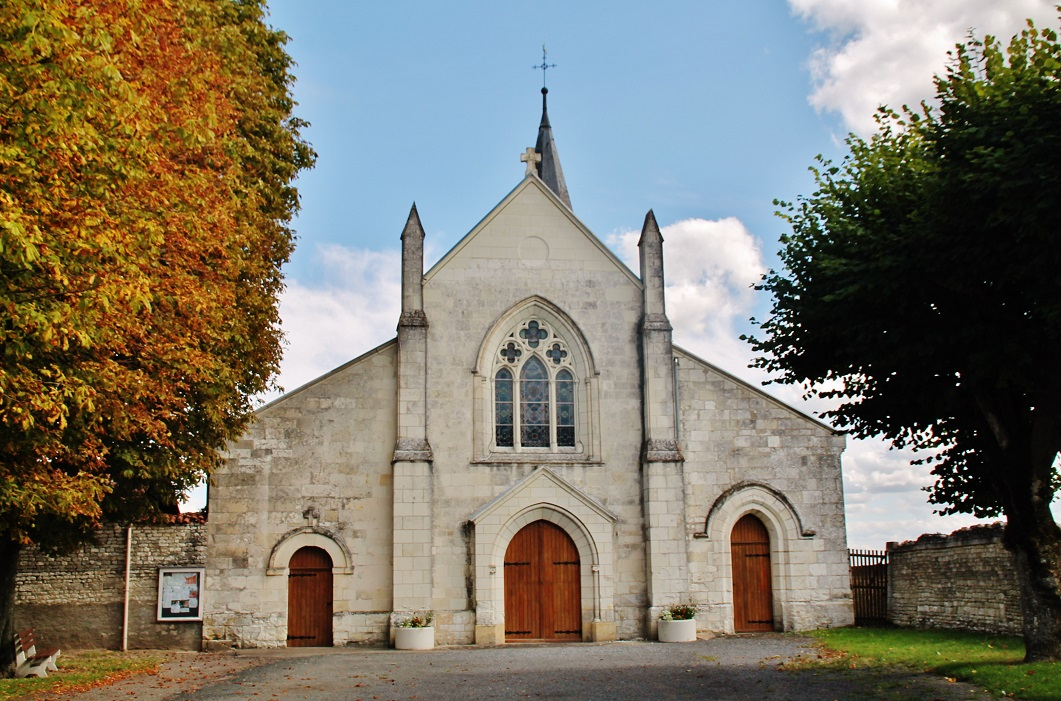 église St Gelin